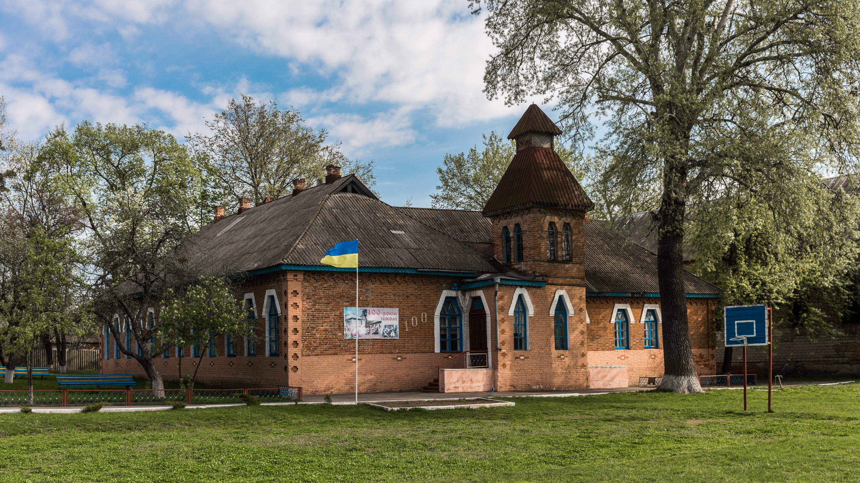 Трикомплектна земська школа в селі Курінька Чорнухинського району Полтавської області. Стиль - український архітектурний модерн. Архітектор Опанас Сластьон.